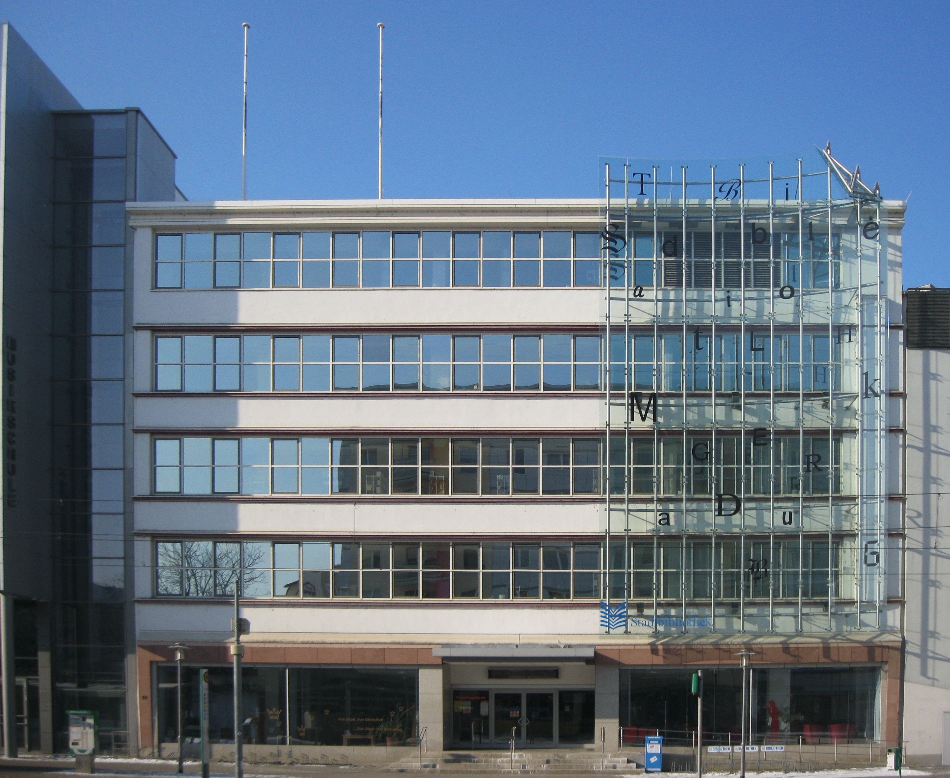 Seit 1929 Kaufhaus im Breiten Weg, seit 1997/99 Umbau des Kaufhaus zur Stadtbibliothek durch Nattler